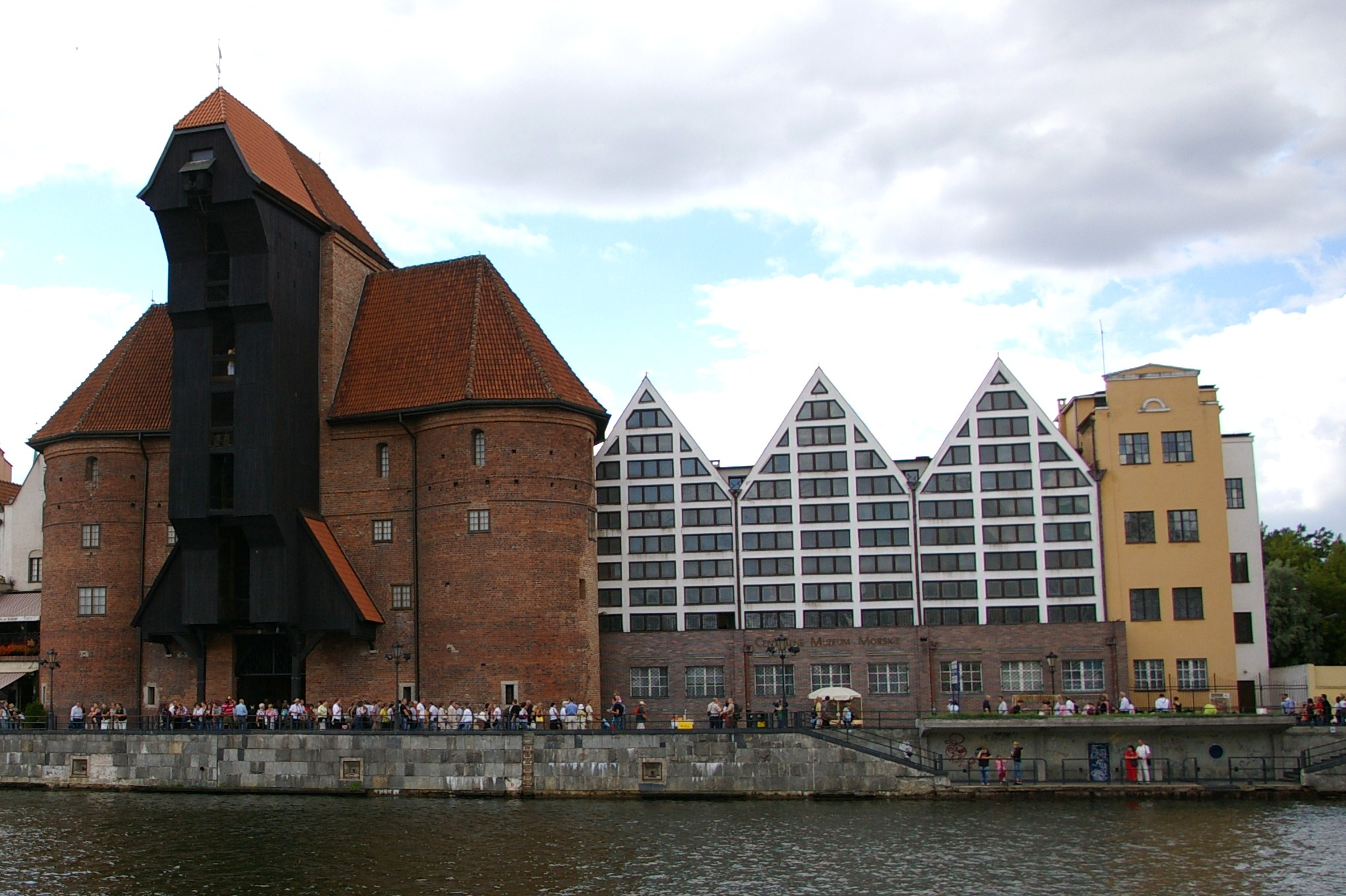 Żuraw i kamieniczki - siedziba Centralnego Muzeum Morskiego w Gdańsku.